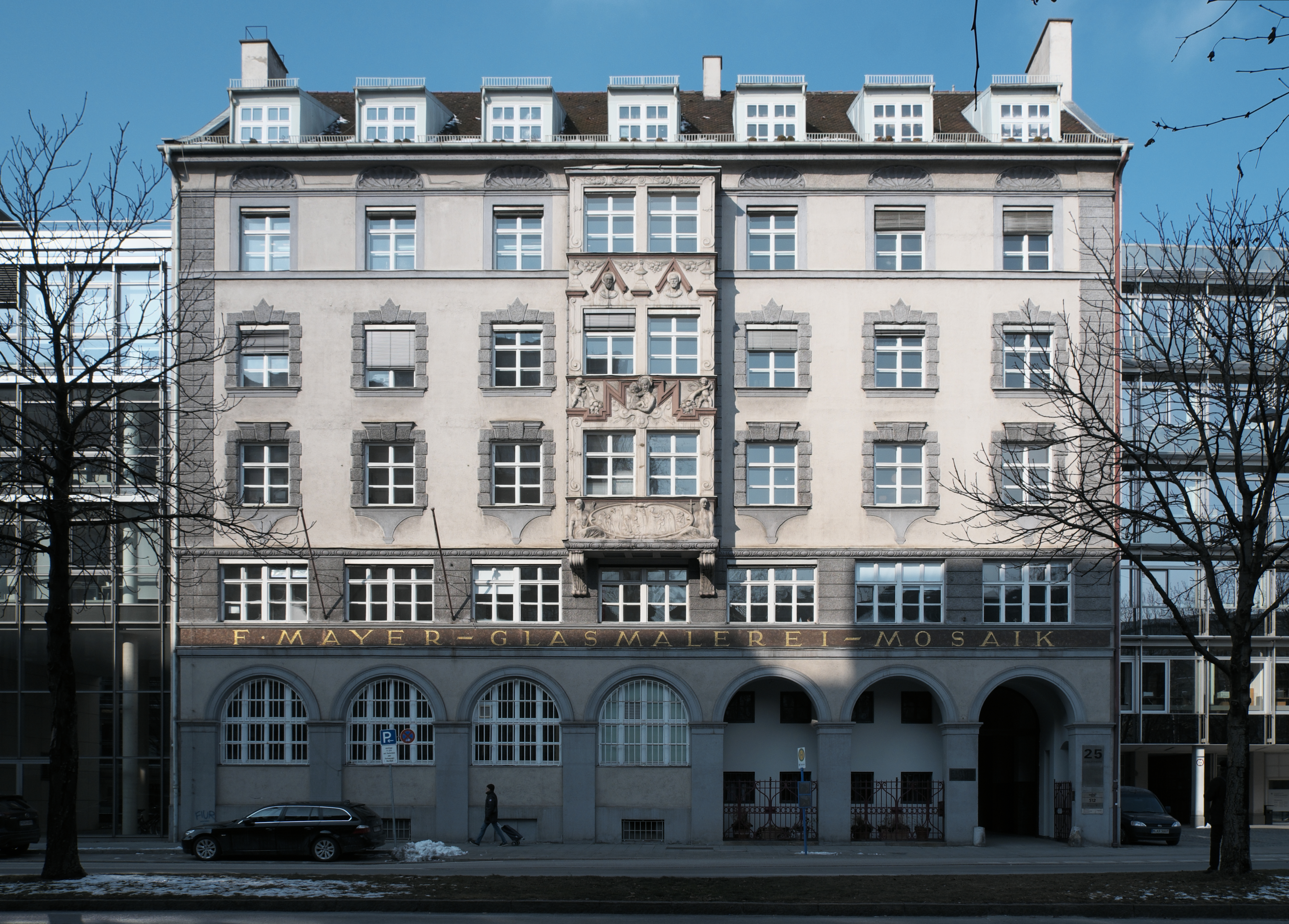 Mayer’sche Hofkunstanstalt in der Seidlstraße 25 im Stadtbezirk Maxvorstad in München (Bayern/Deutschland)